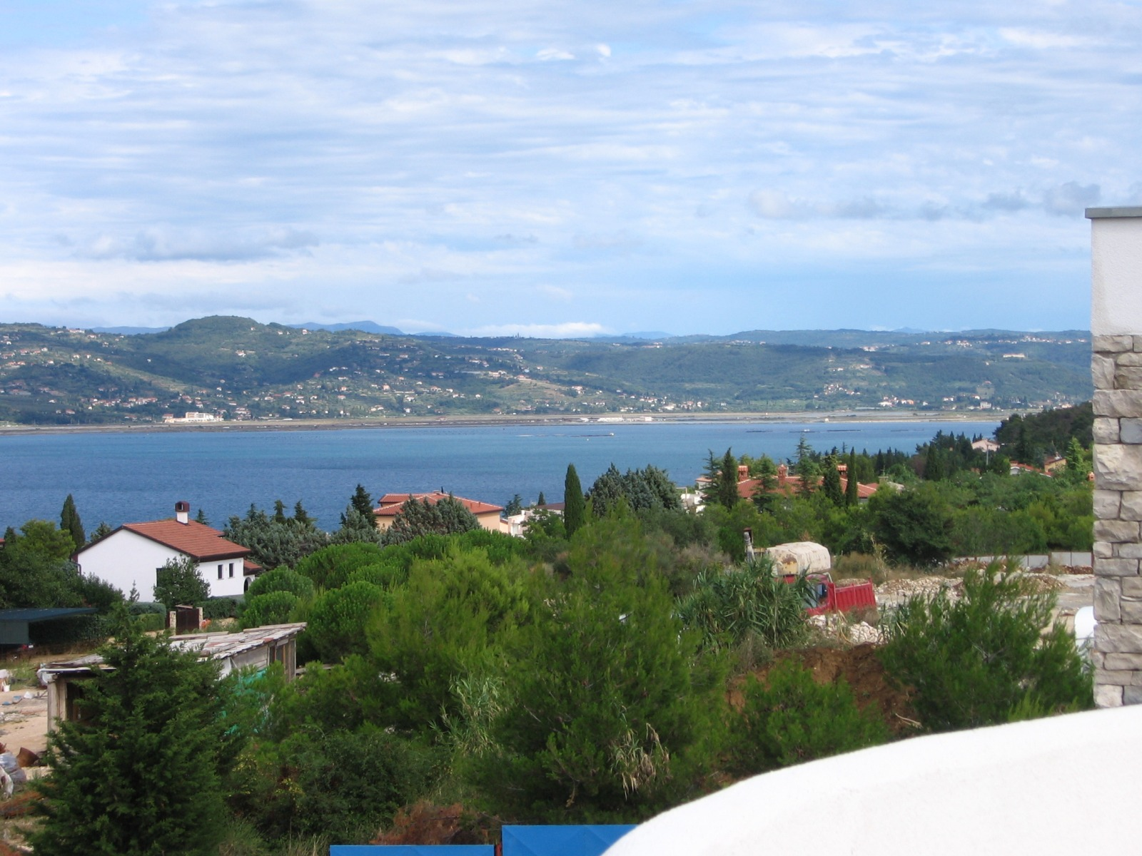 Piranski zaliv in sečoveljske soline